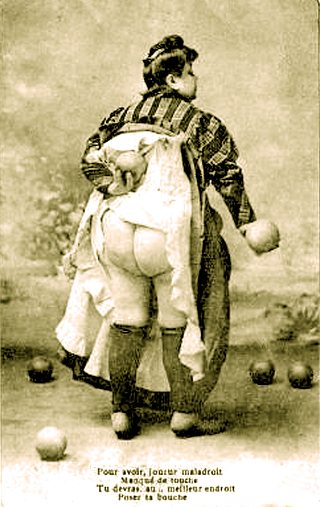 Carte postale de Fanny, éditée en 1896